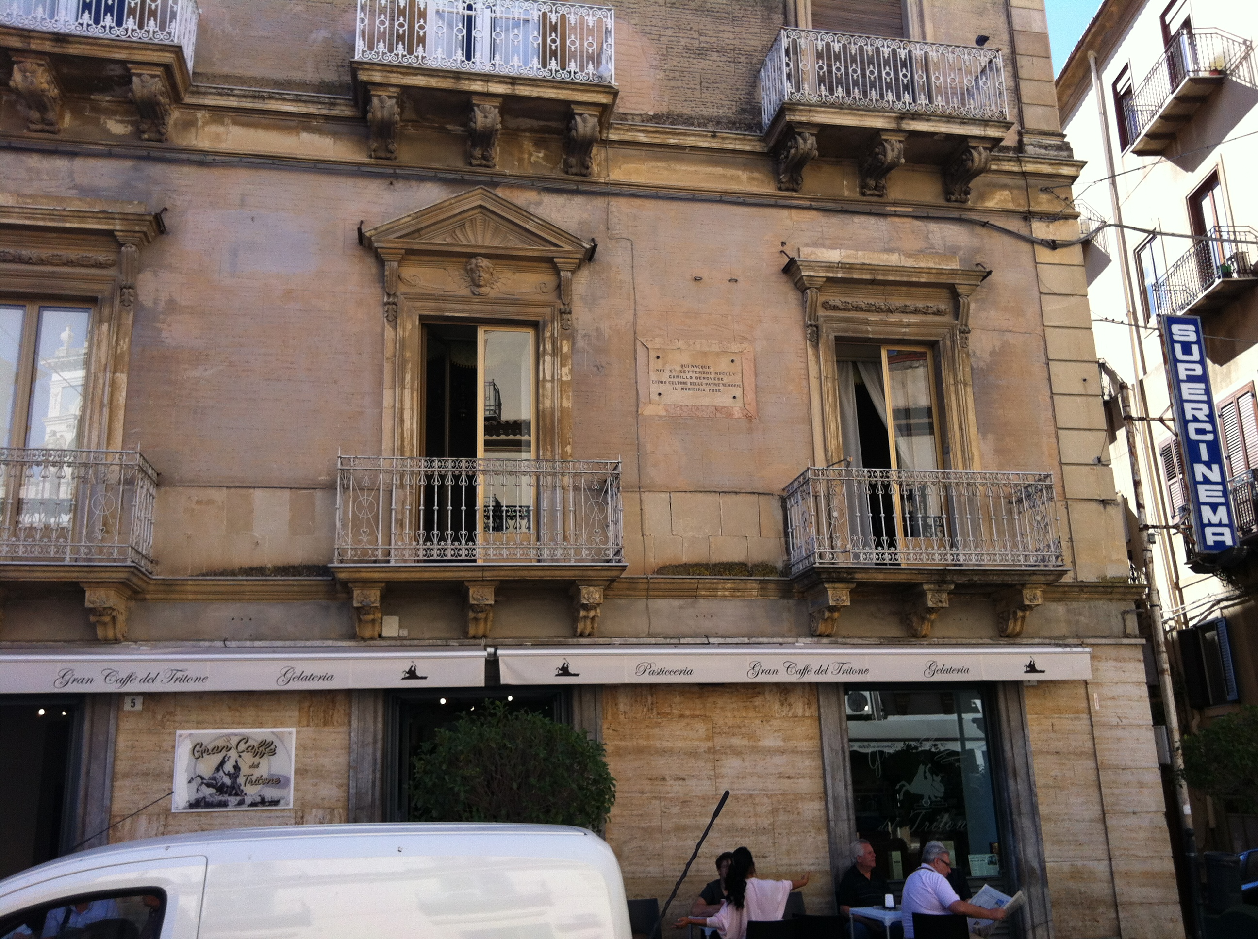 Casa natale di Camillo Genovese in C.so Umberto I a Caltanissetta. Secondo lo storico nisseno Giovanni Mulè Bertolo nel suo libro: Caltanissetta nei tempi che furono e nei tempi che sono. 1906 p. 35-36 si contesta la collocazione della lapide, infatti scrive: " A sinistra di chi va innanzi e dopo lo sbocco in via Taschetti la prima casa rimodernata, che sta al cantone ed è oggi proprietà dei signori La Villa, fu culla del barone Camillo Genovese, altra gloria caltanissettese. Il Municipio ha fatto bene a volere indicarne il luogo della nascita, ma proprio ha preso una vera cantonata, apponendo la lapide marmorea alla casa dell'on. Cascino, che fa riscontro alla casa La Villa. gli errori si correggono